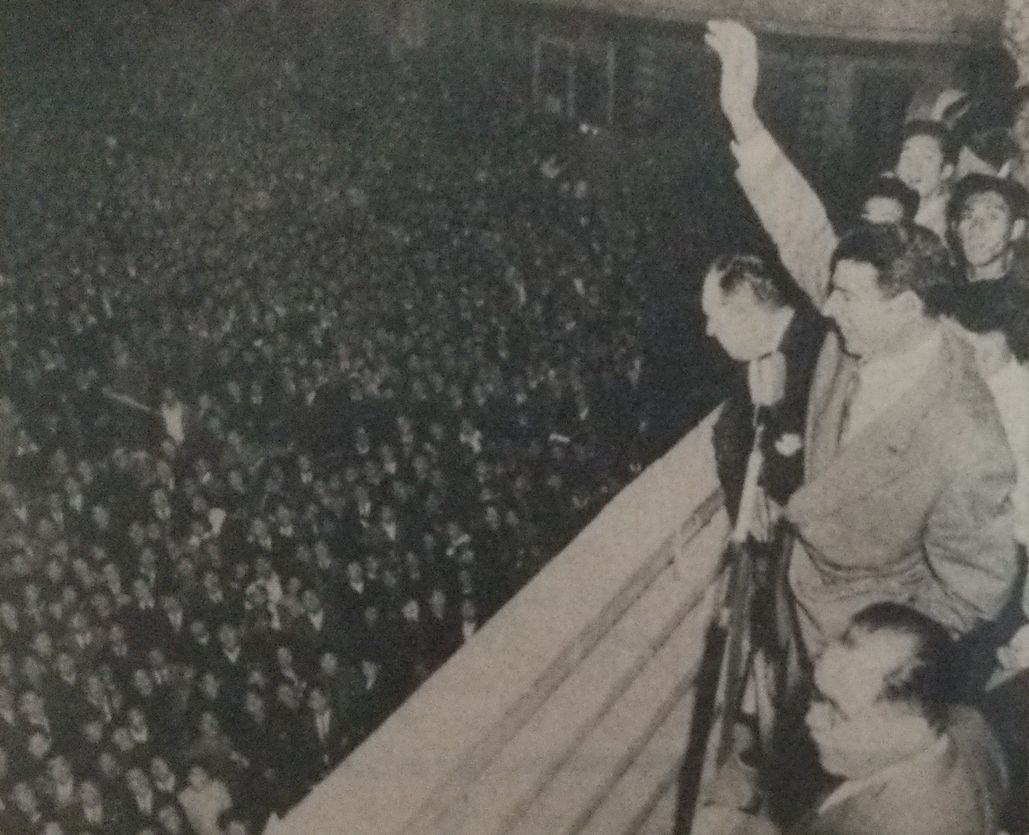 1950年の訪日時のジョー・ディマジオとレフティ・オドール